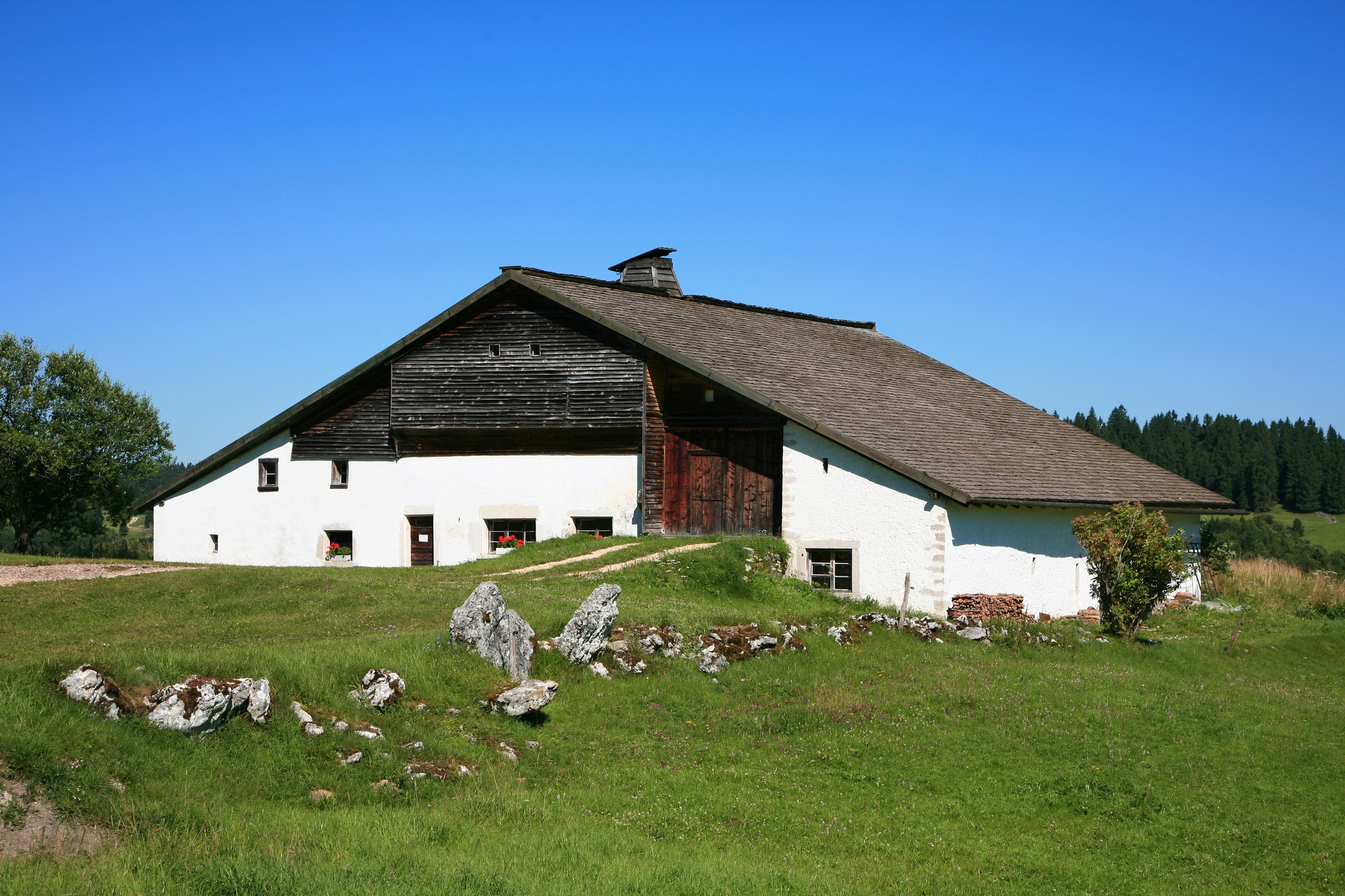 Le Grand Cachot